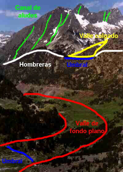 Enciclopedia Libre. Autor: Corso en Wikipedia / Corso en Enciclopedia Libre (septiembre de 2003).